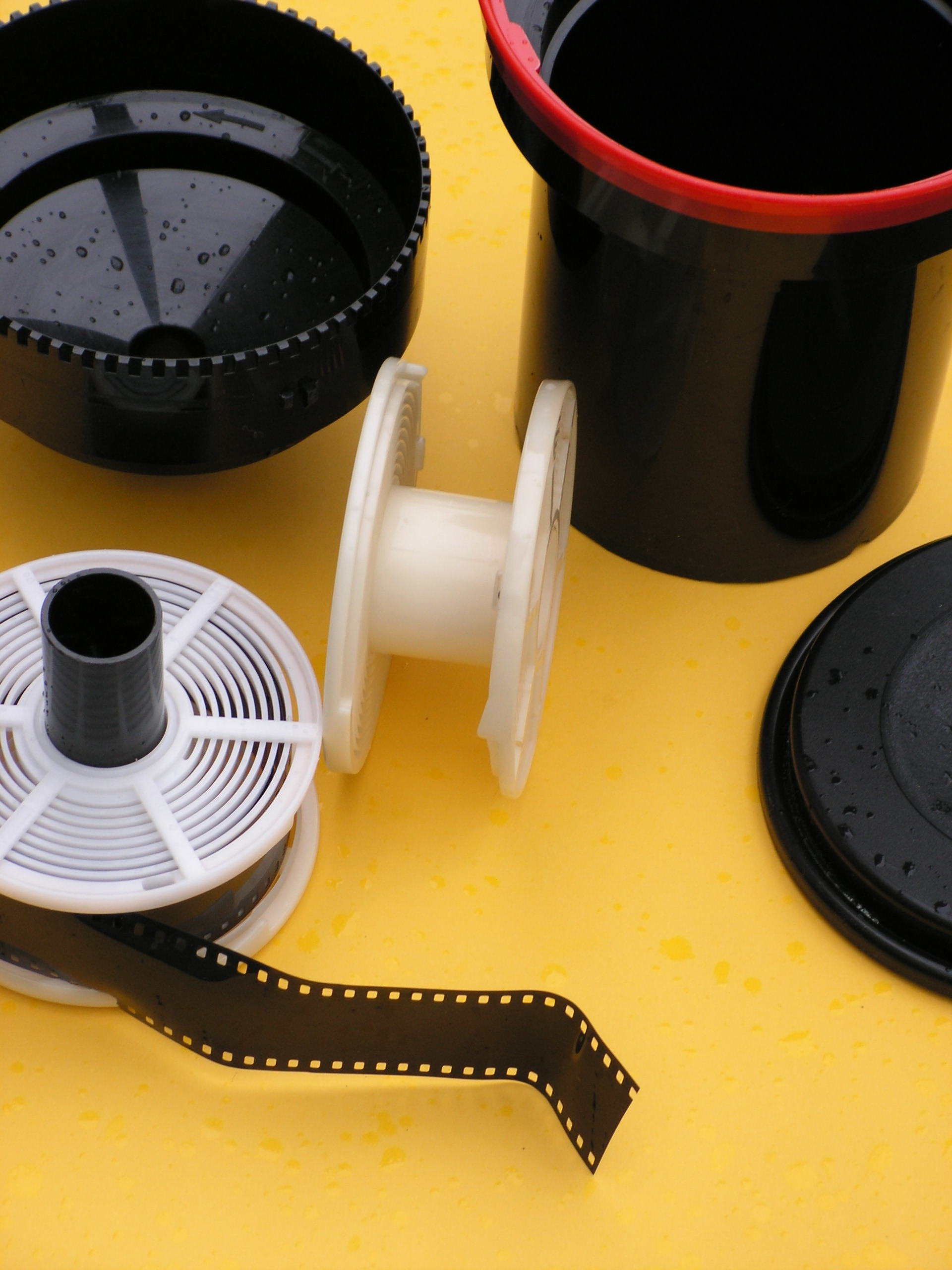 Jag har tagit bilden själv och alla kan använda den Stefan.lila 18 maj 2006 kl.13.37 (CEST)